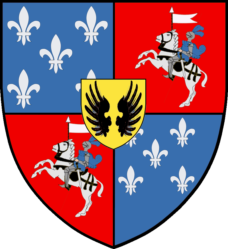 Vapensköld för grevliga adelsätten Brahe nummer 1